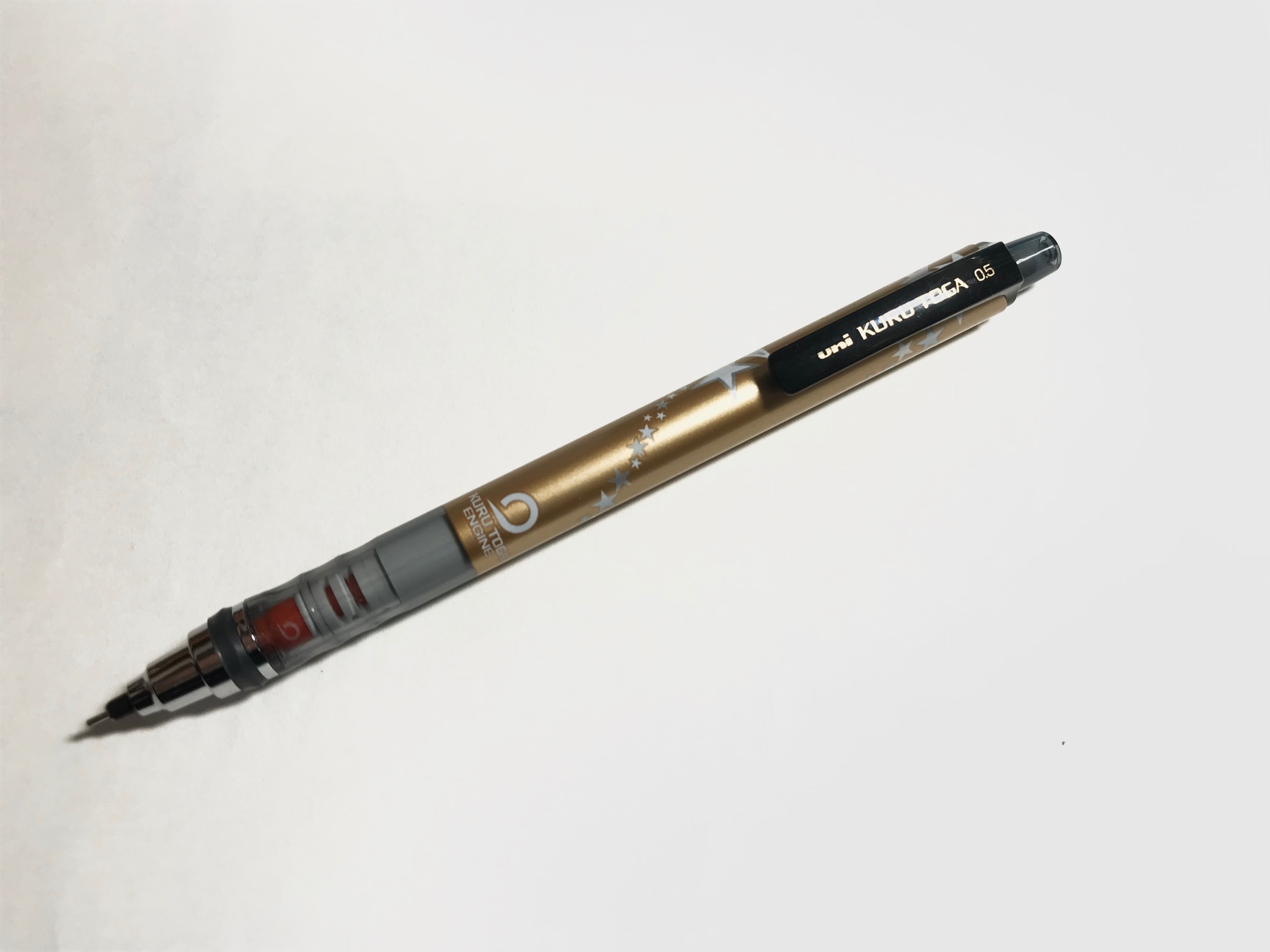 Benesseの進研ゼミ中学講座の受講者限定特典として送られたクルトガ（非売品）